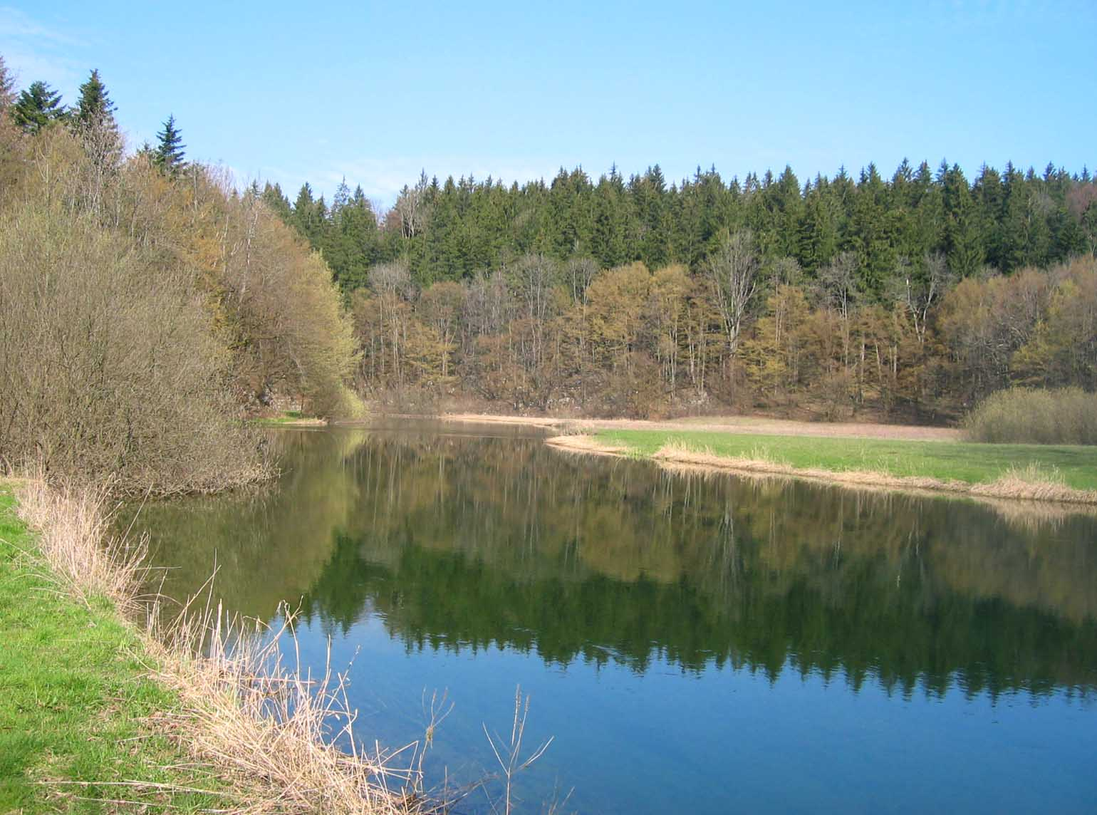 Rakov Škocjan, natural park in Slovenia, "Rak" river photo:Ziga 18:48, 7 April 2007 (UTC)